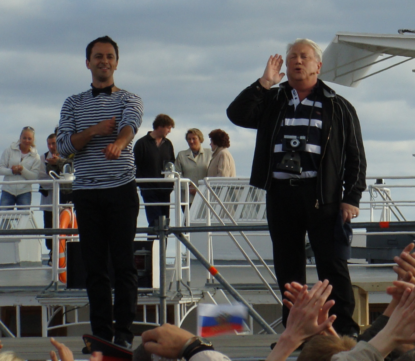 Выступление артистов телепрограммы "Аншлаг" на 425-летии города Архангельска